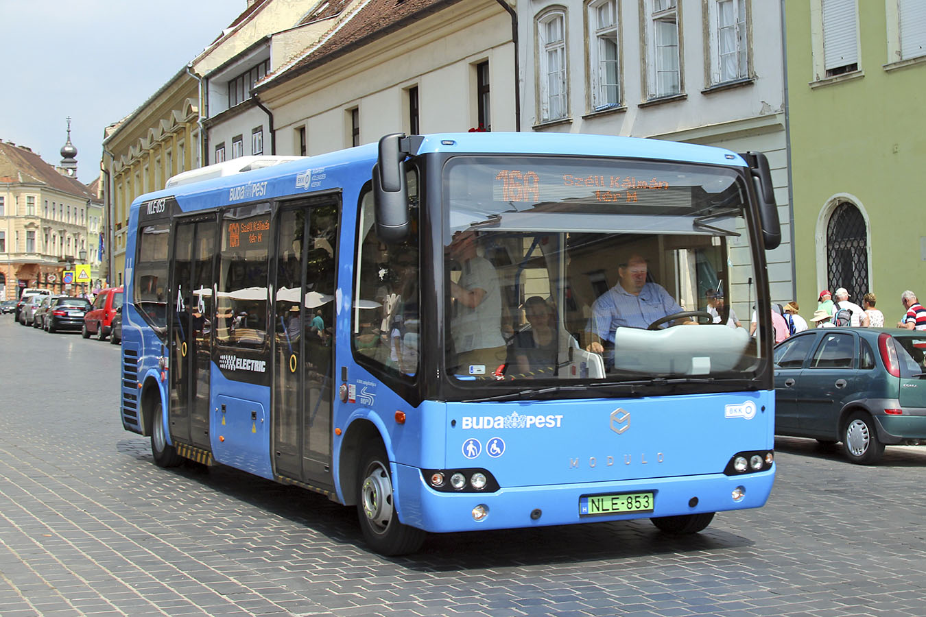 Evopro Modulo Medio Electric a 16A vonalon